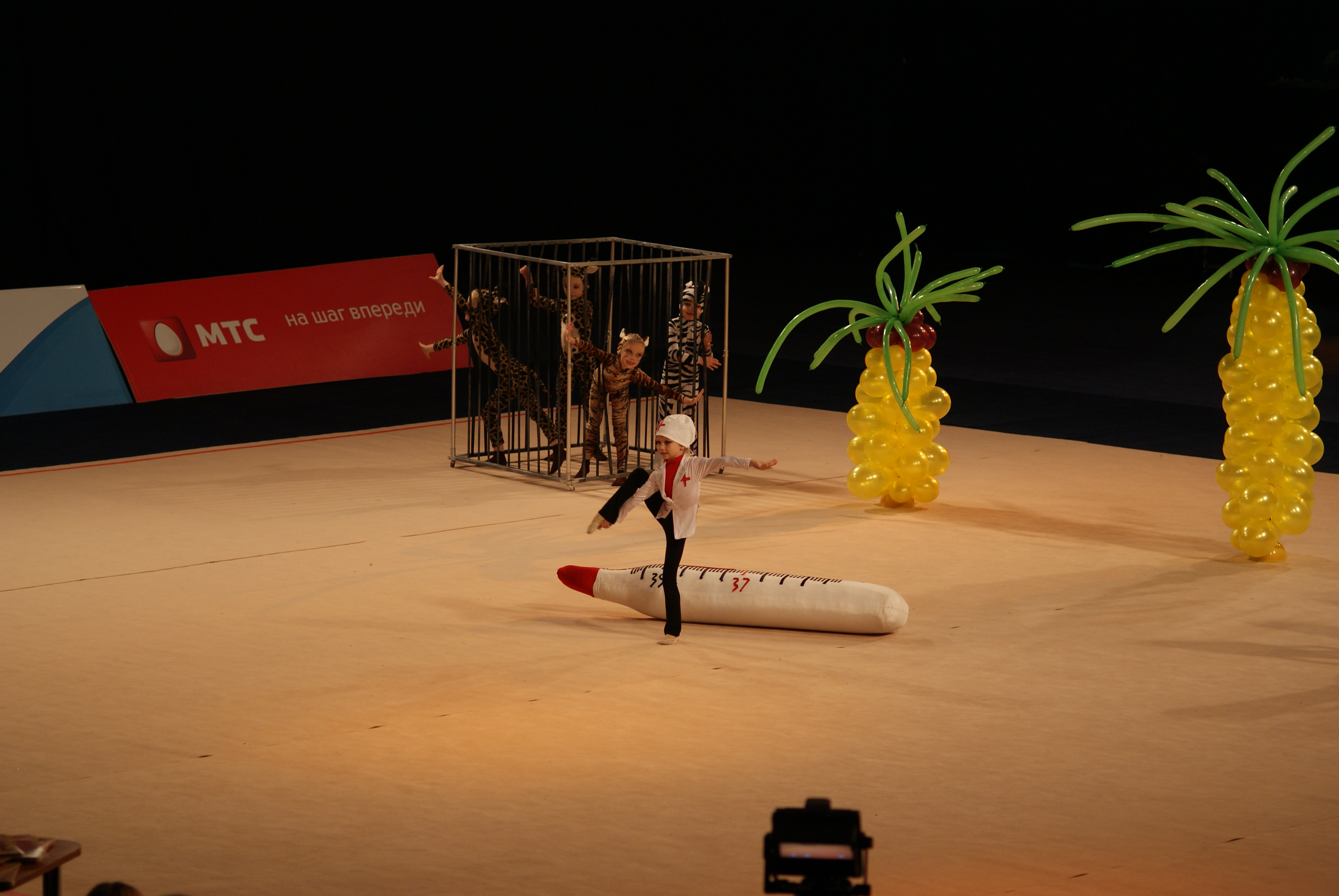 Турнір па мастацкай гімнатыцы для дзяцей Baby Cup BelSwissBank-2013, Мінск